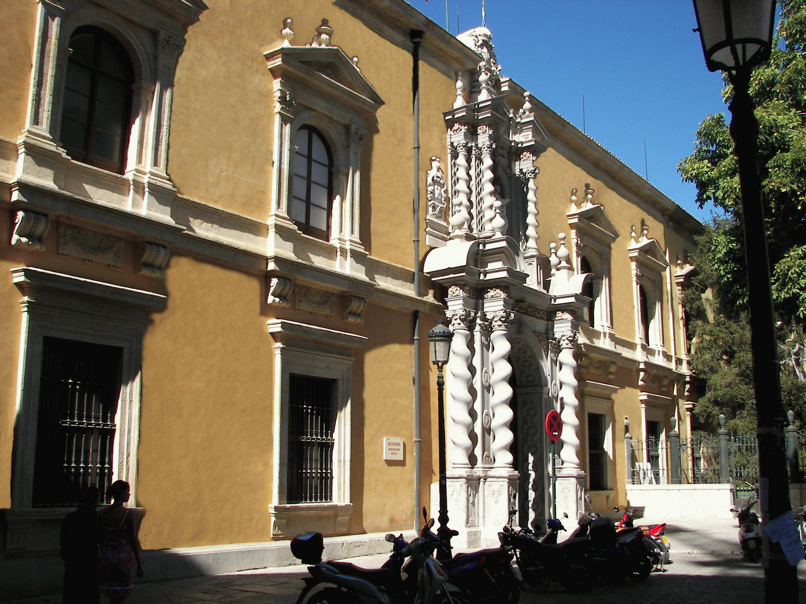 Entrada por la Plaza de la Universidad